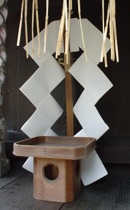 Gohei 御幣（宇治市木幡 許波多神社にて撮影）